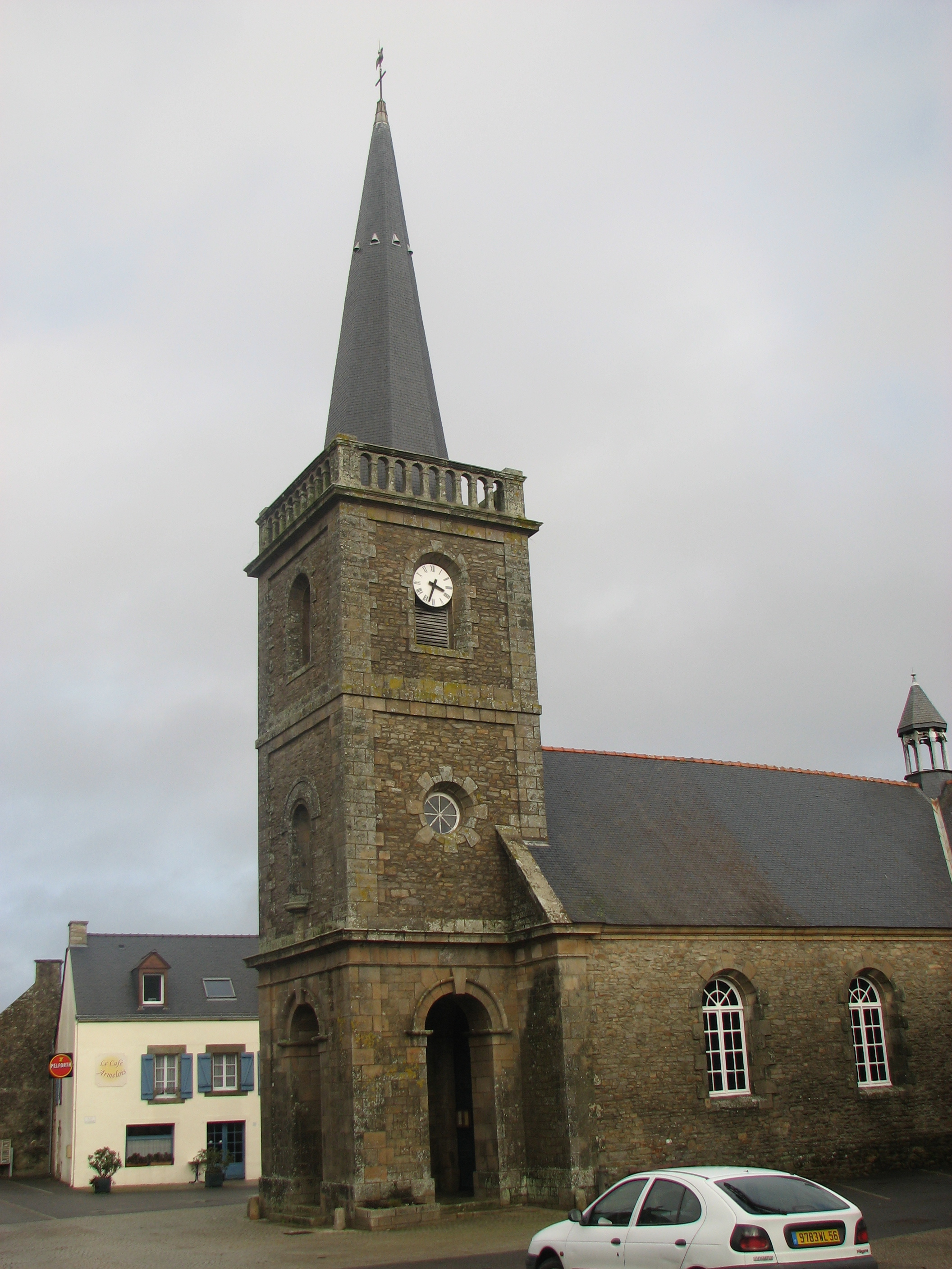 Église de St-Armel (Morbihan)